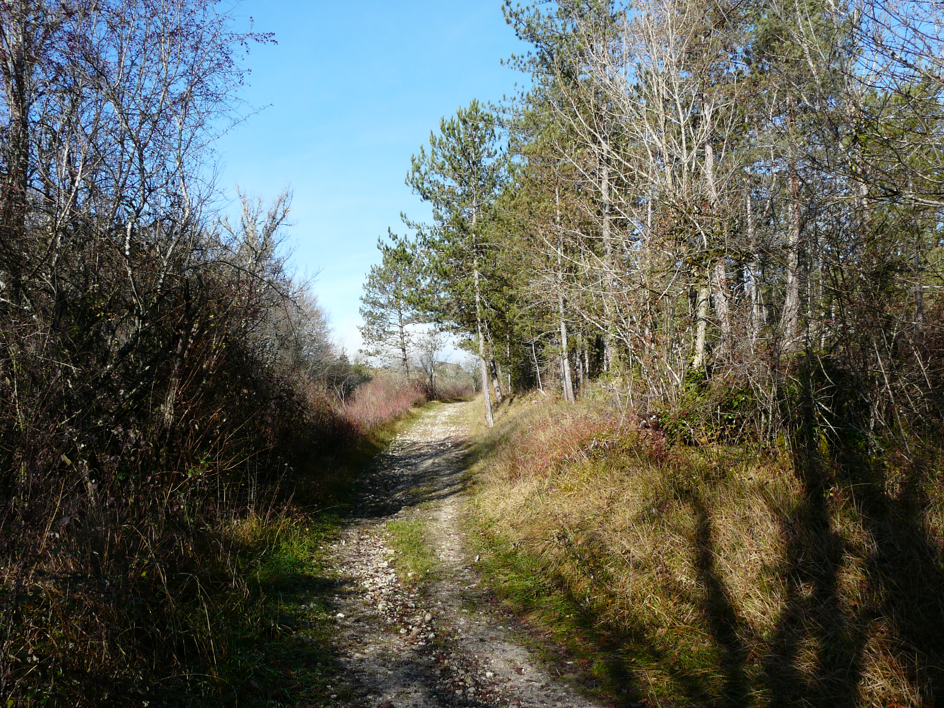 Le sentier de grande randonnée GR 36 au sud-est-du lieu-dit Loubatières, Milhac-d'Auberoche, Dordogne, France.